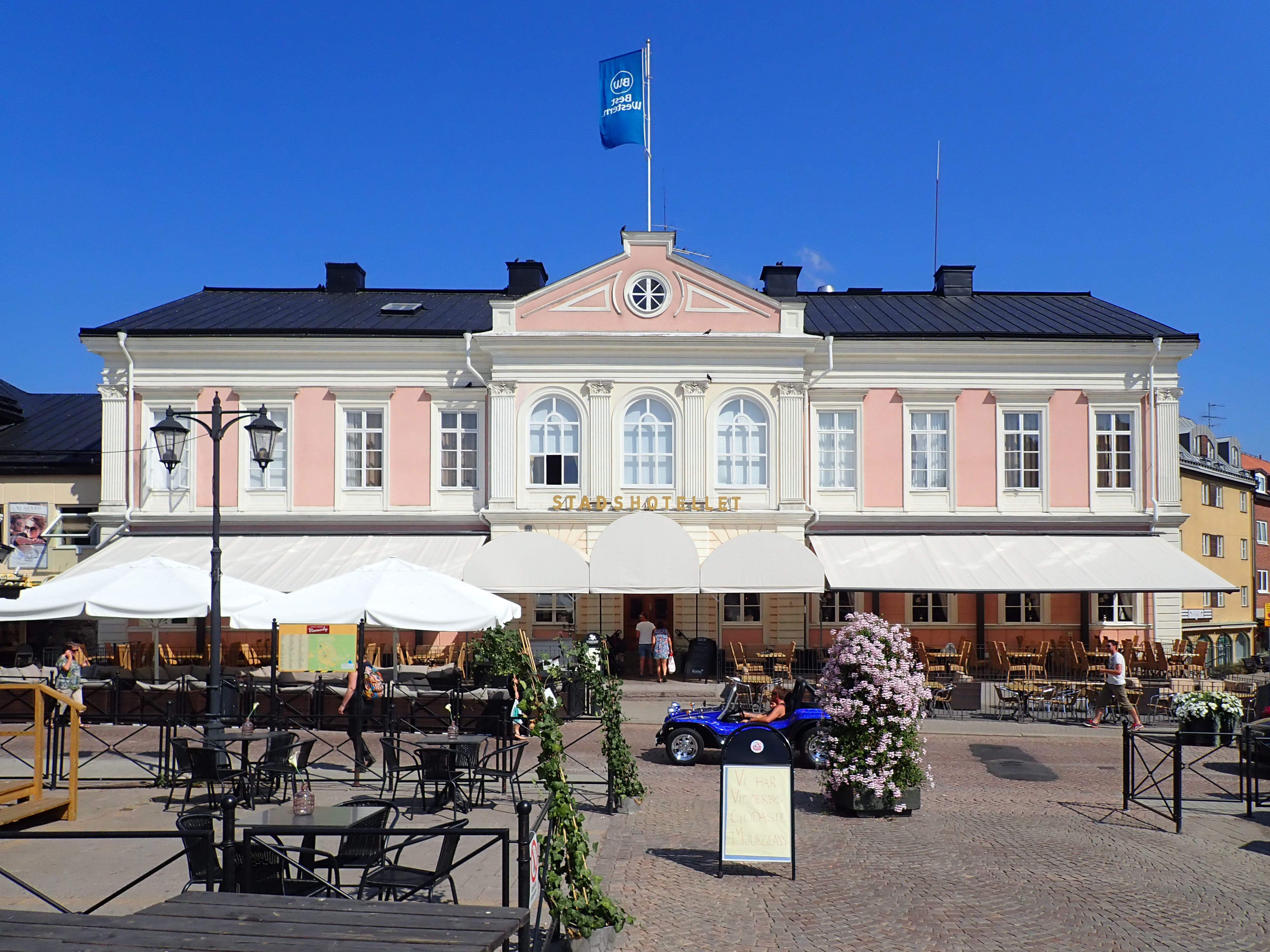 Stadshotellet i Vimmerby. Byggnadsår 1867-1868. Arkitekt Hugo Hammarskjöd. Byggmästare Jonas Jonsson